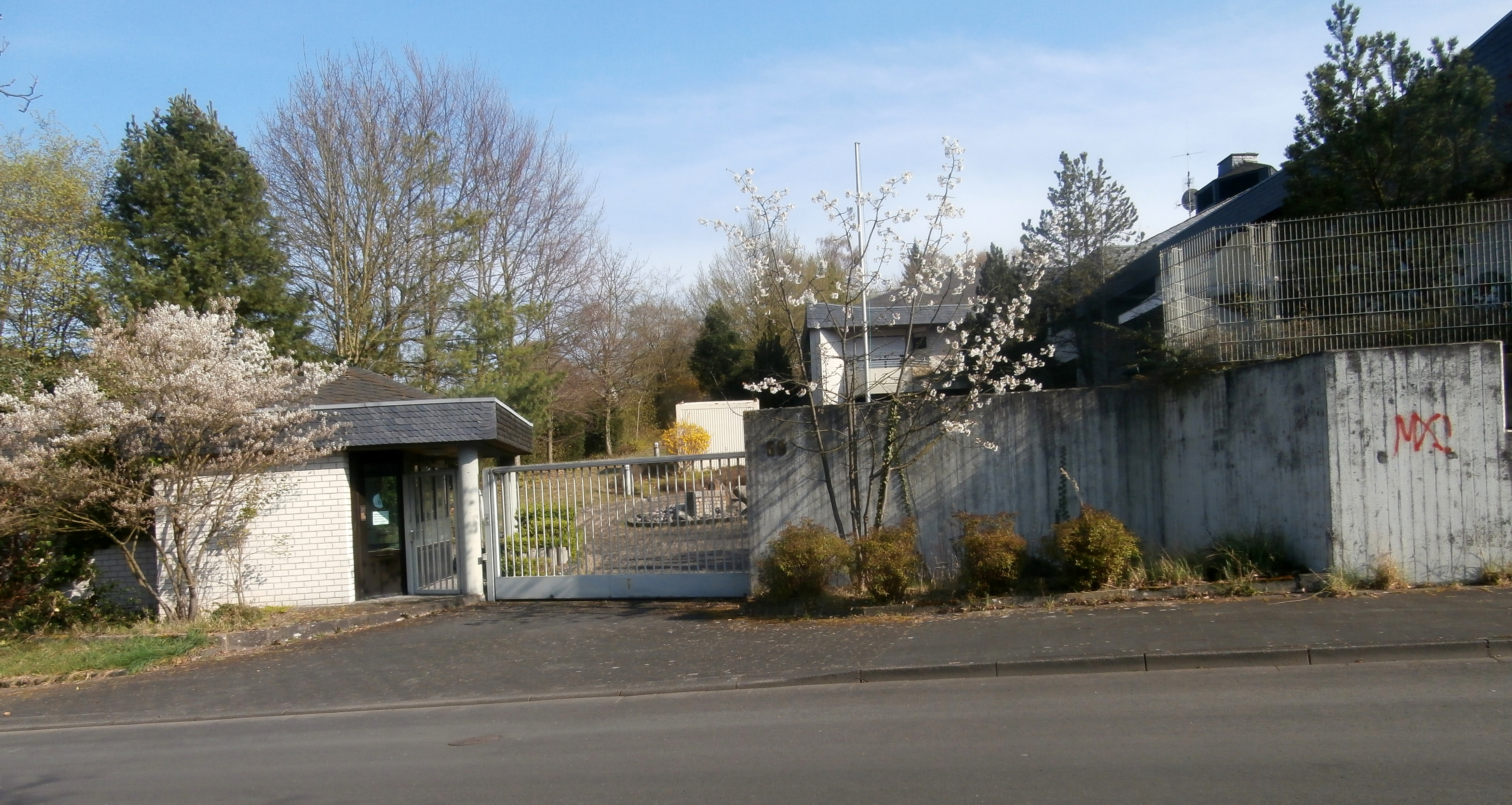 Ehemalige Residenz der Botschaft von Nigeria, Vulkanstraße 69, Mehlem, Bad Godesberg: Eingang